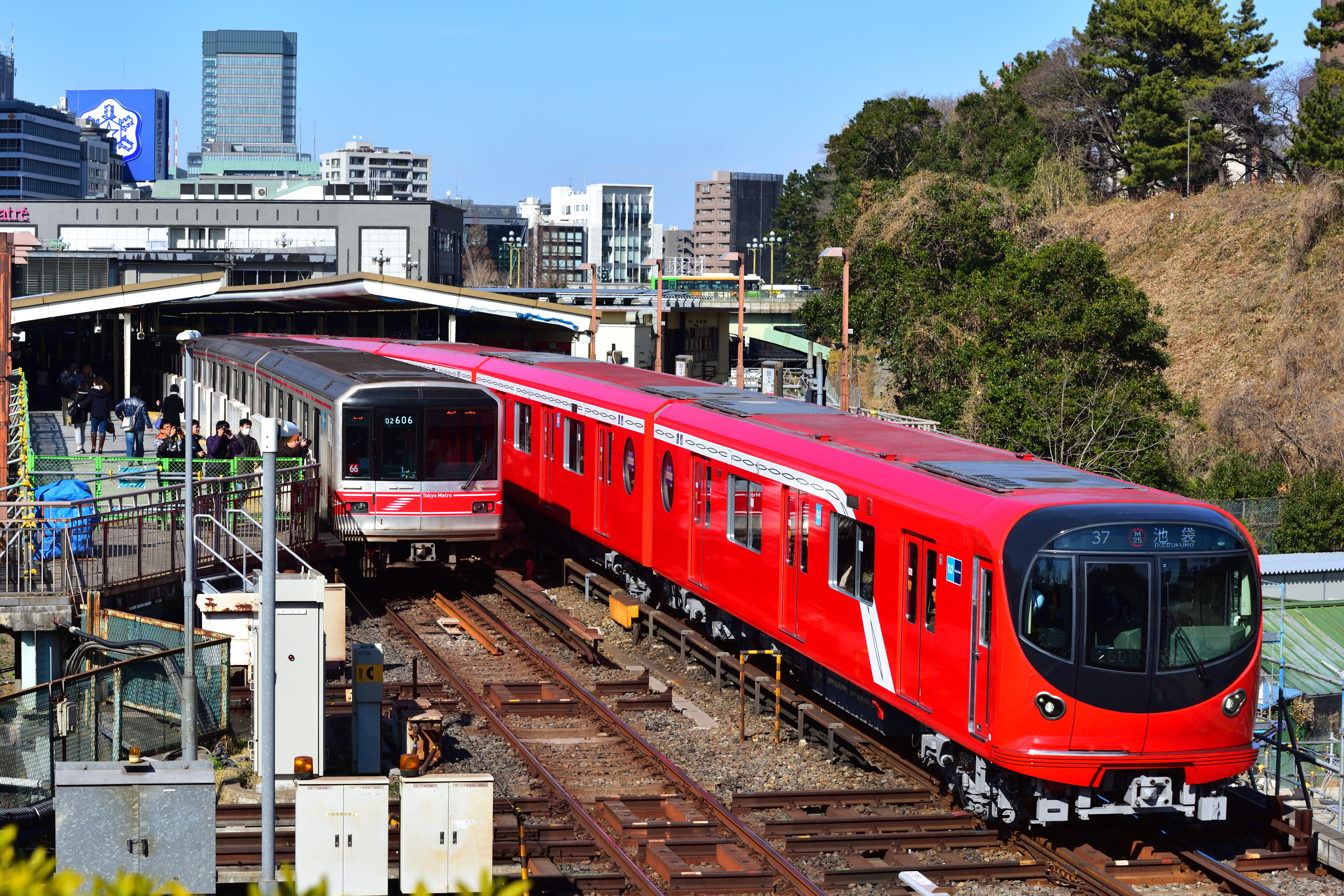 東京メトロ丸ノ内線 02系・2000系 四ツ谷駅 Nikon D750